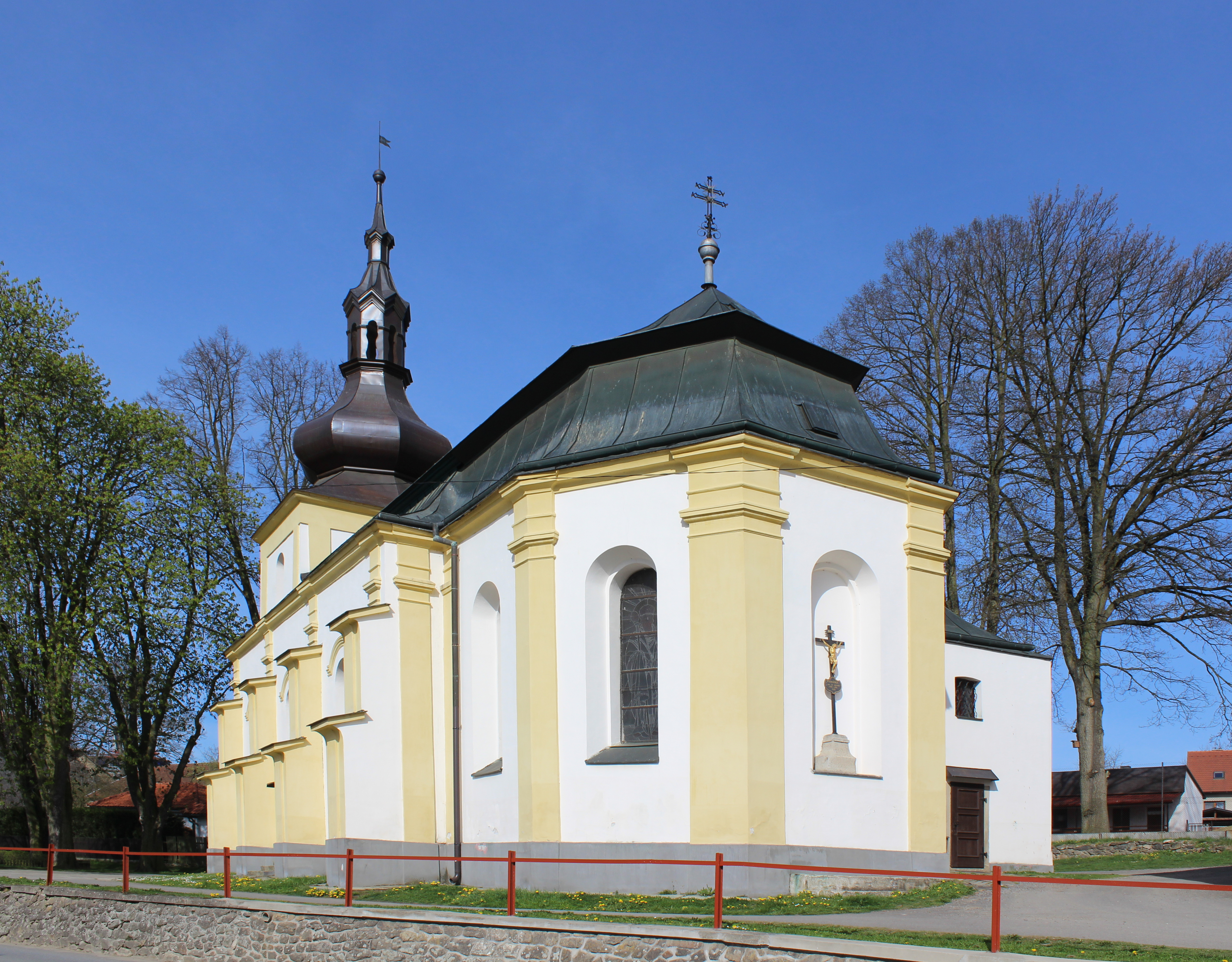 Kostel svatého Vavřince v Rynárci v okrese Pelhřimov. Project: Fotíme Česko.